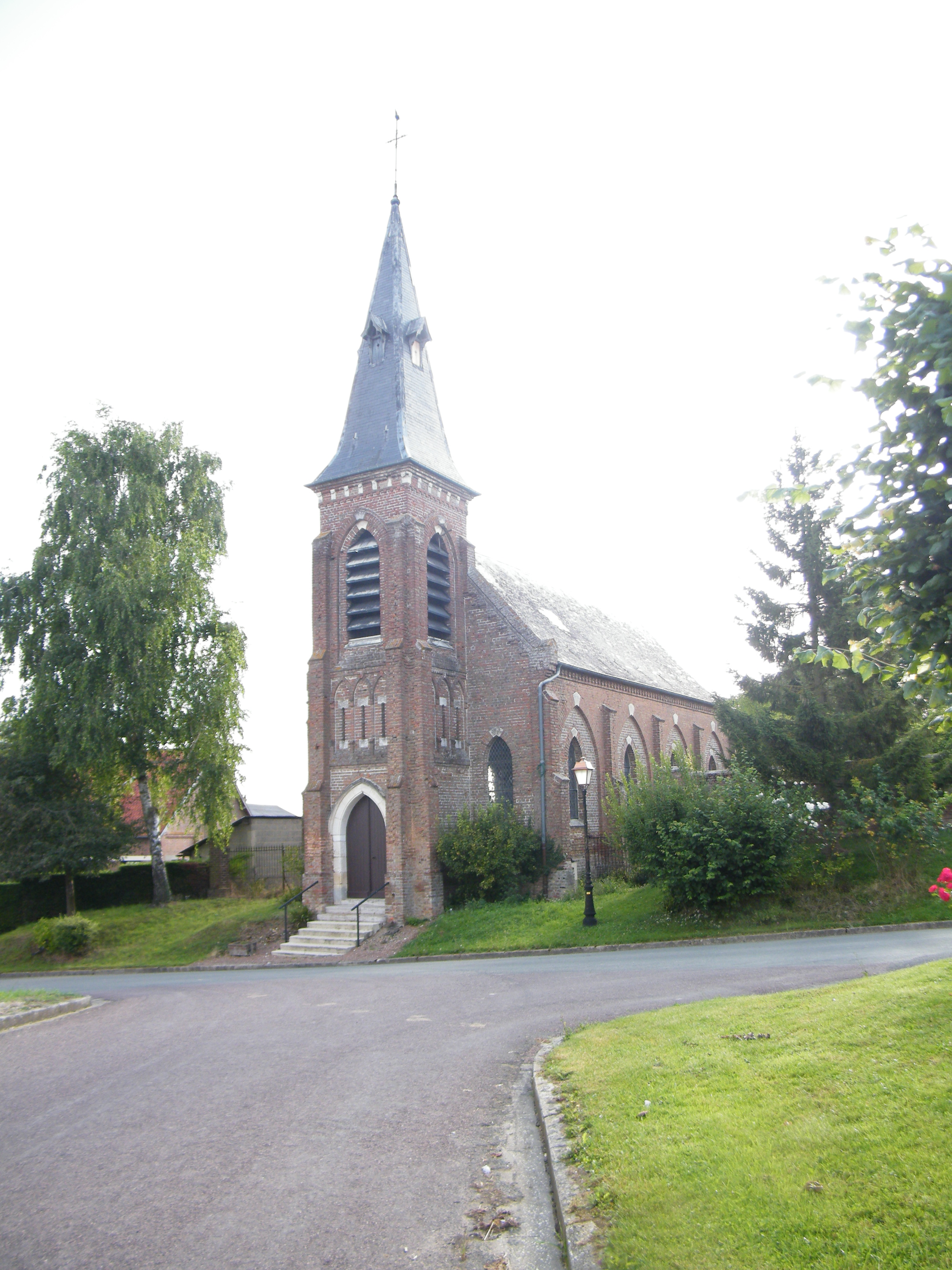 église.